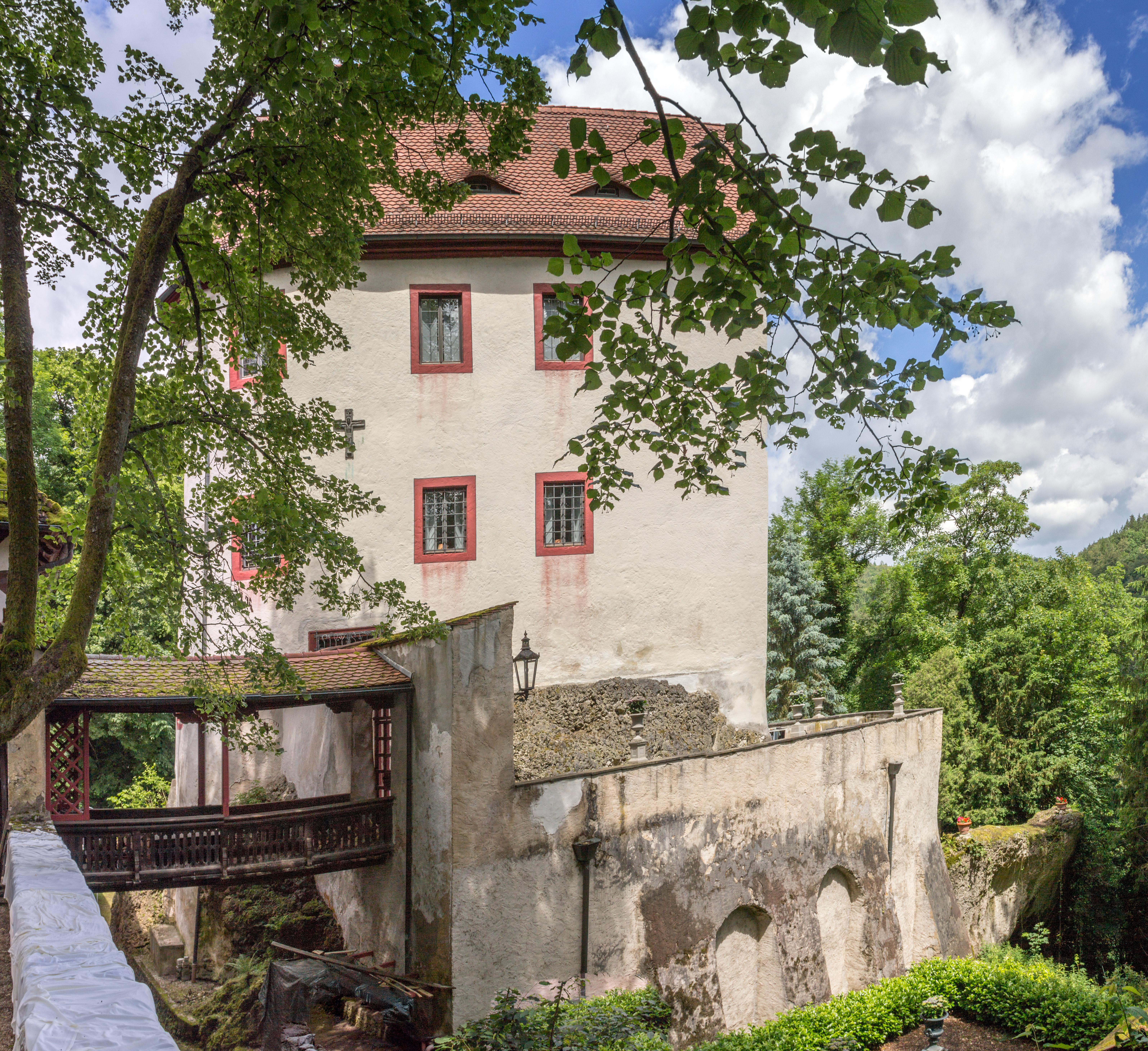 Burg Gaillenreuth, Mit Wohnturm, Teilen der ehemaligen Befestigung und Gräben sowie ehemalige Vorburg mit Jagdhaus und Stadel; Wohnturm (sogenannte vordere Kemenate) mehrgeschossiger verputzter Massivbau mit einseitig halbrund abgewalmtem Satteldach, im Kern 13./14. Jahrhundert, Renovierungen nach 1525, nach 1632, erste Hälfte 19. Jahrhundert; Graben und Befestigungsmauern und Kelleranlage, Naturstein 13. bis 16. Jahrhundert; ehemaliges Jägerhaus, jetzt Gasthaus, zum Graben drei-, sonst zweigeschossiger Bau, Massiv mit zweitem Obergeschoss in Fachwerk um 1600, angefügter Südostflügel mit historistischem Fachwerkobergeschoss um 1900, über älterem massivem Erdgeschoss, gemeinsames Walmdach, wohl 1920er Jahre; Scheune, Fachwerkbau mit rückwärtig abgewalmtem Satteldach, 18. Jahrhundert, Nebengebäude, erdgeschossiger Satteldachbau mit Satteldach, massiv, verputzt, 18. JahrhundertThis is a photograph of an architectural monument.